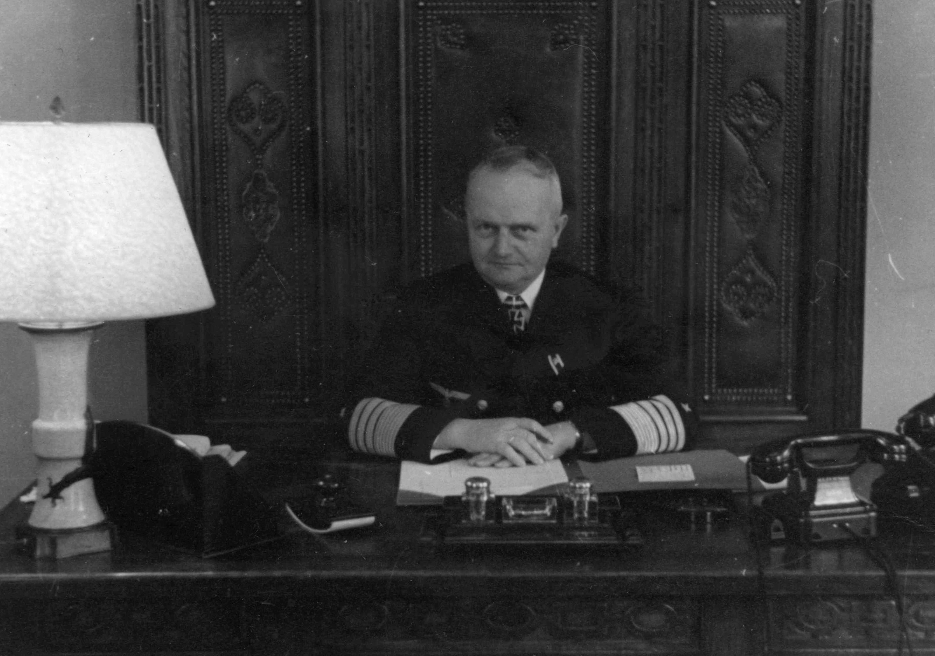 Generaladmiral Alfred Saalwächter am Schreibtisch in seinem Dienstzimmer